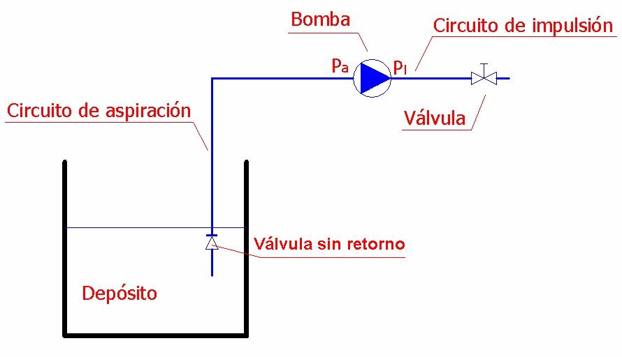 Esquema de un circuito hidraulico sencillo.